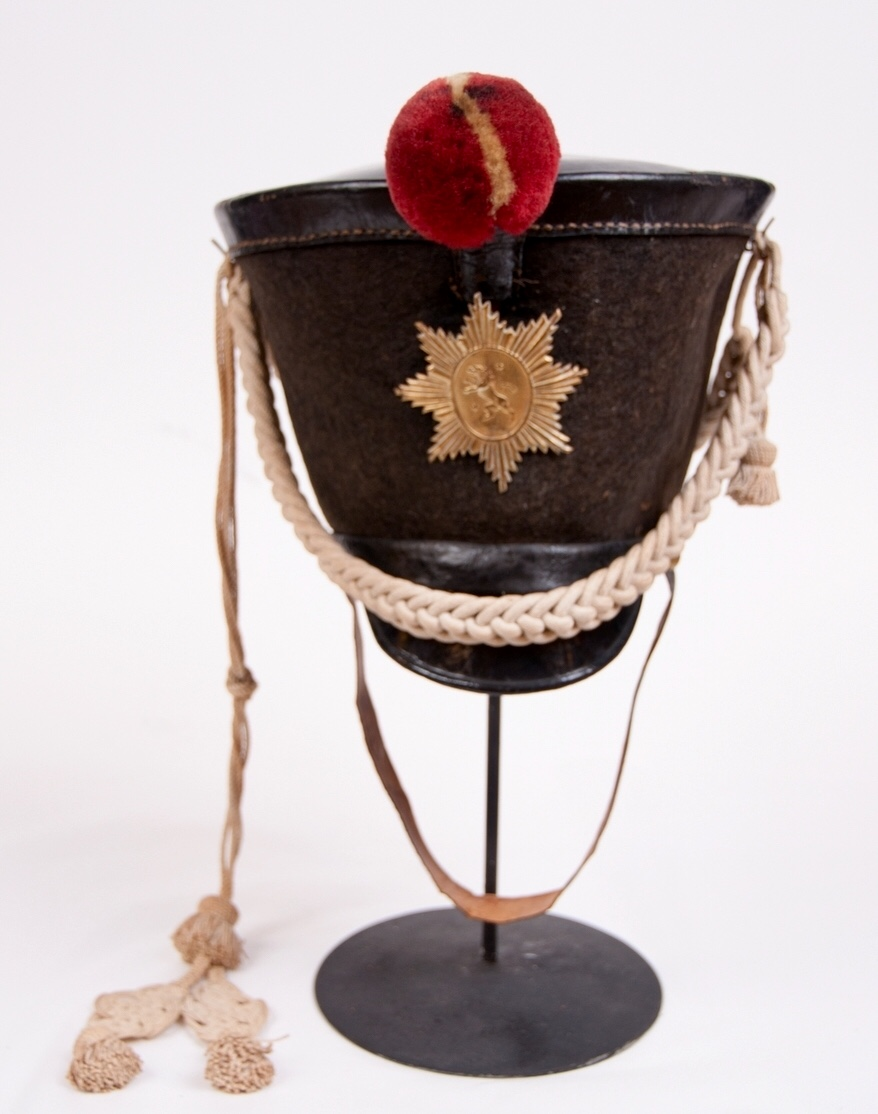 Tillhör Armémuseums samlingar.